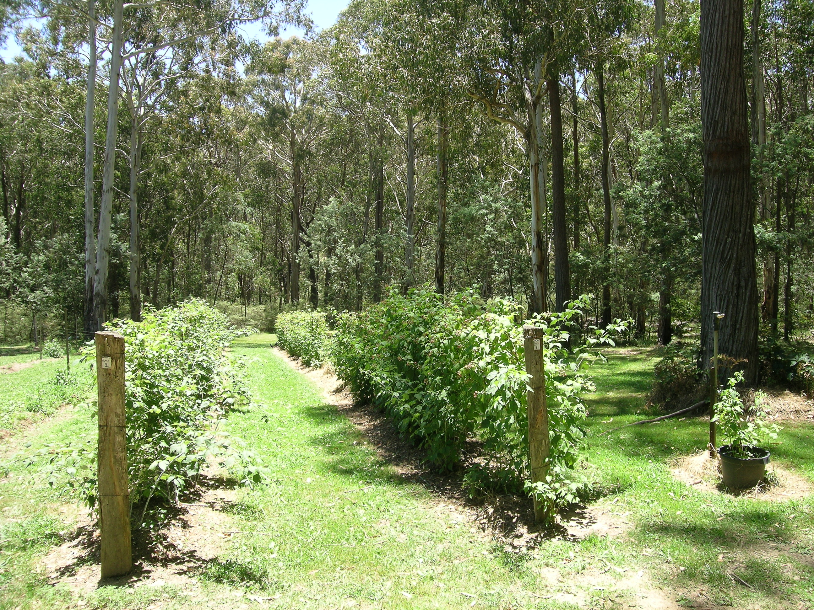 Koolkuna Berry Farm, Niangala, NSW